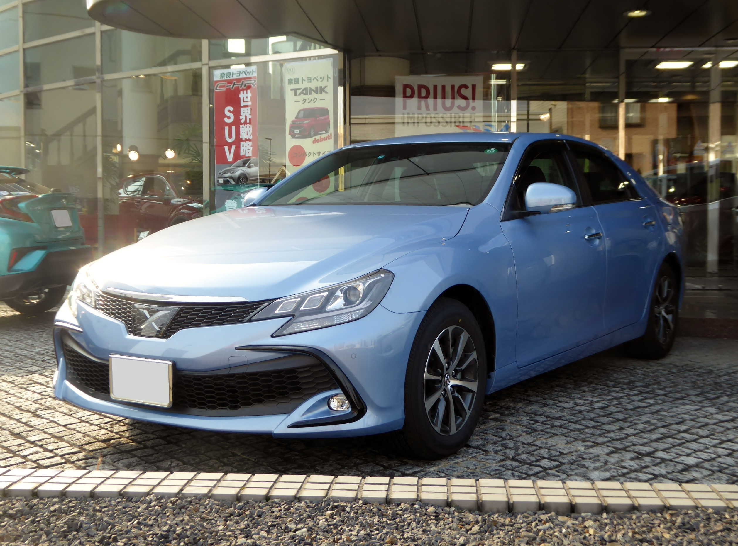 DBA-GRX130-AETSH型トヨタ・マークX 250Sを撮影。